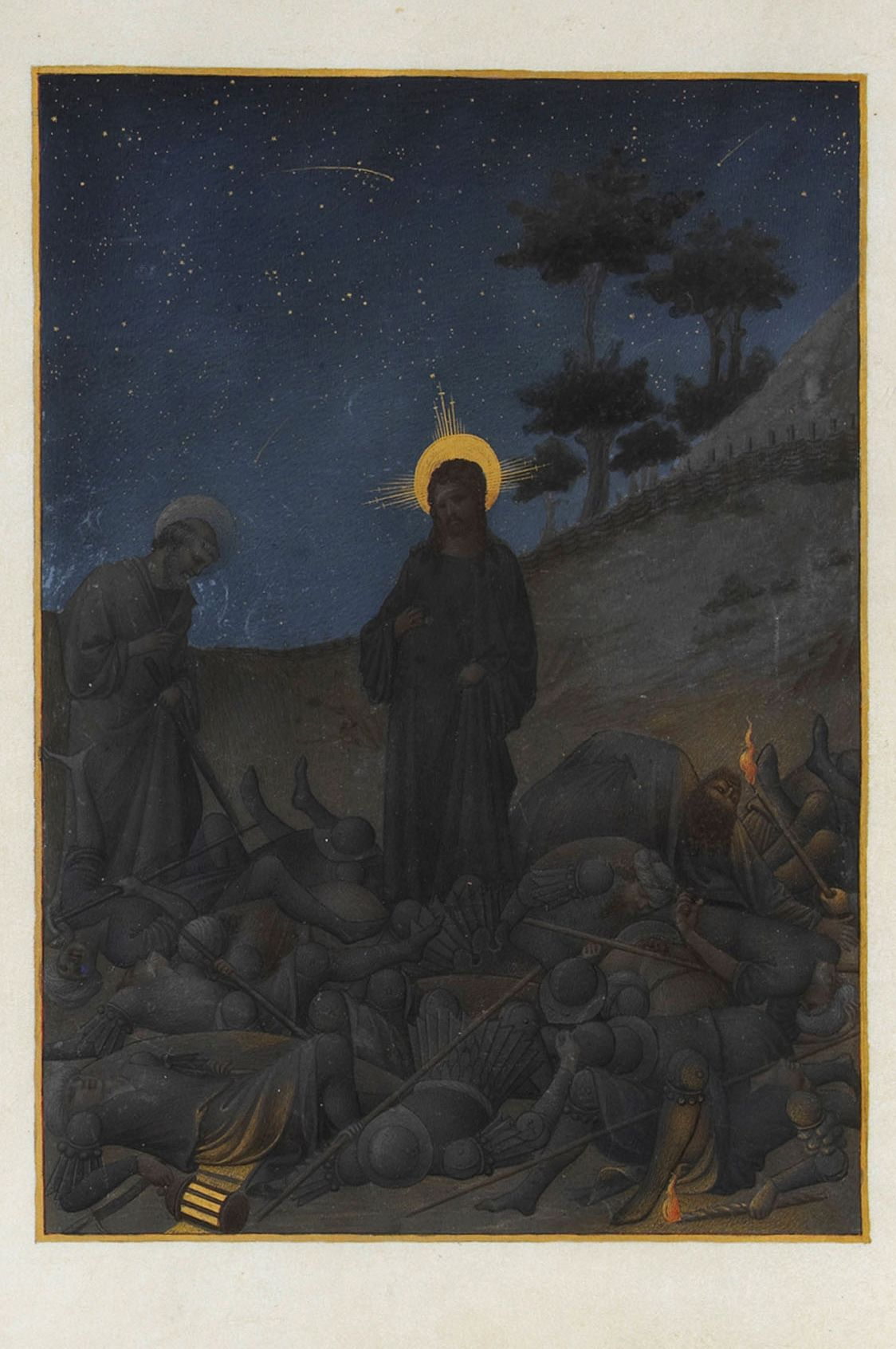 Dans la nuit, le Christ est accompagné de saint Pierre, des soldats venus le chercher se retrouvant atterrés à ses pieds